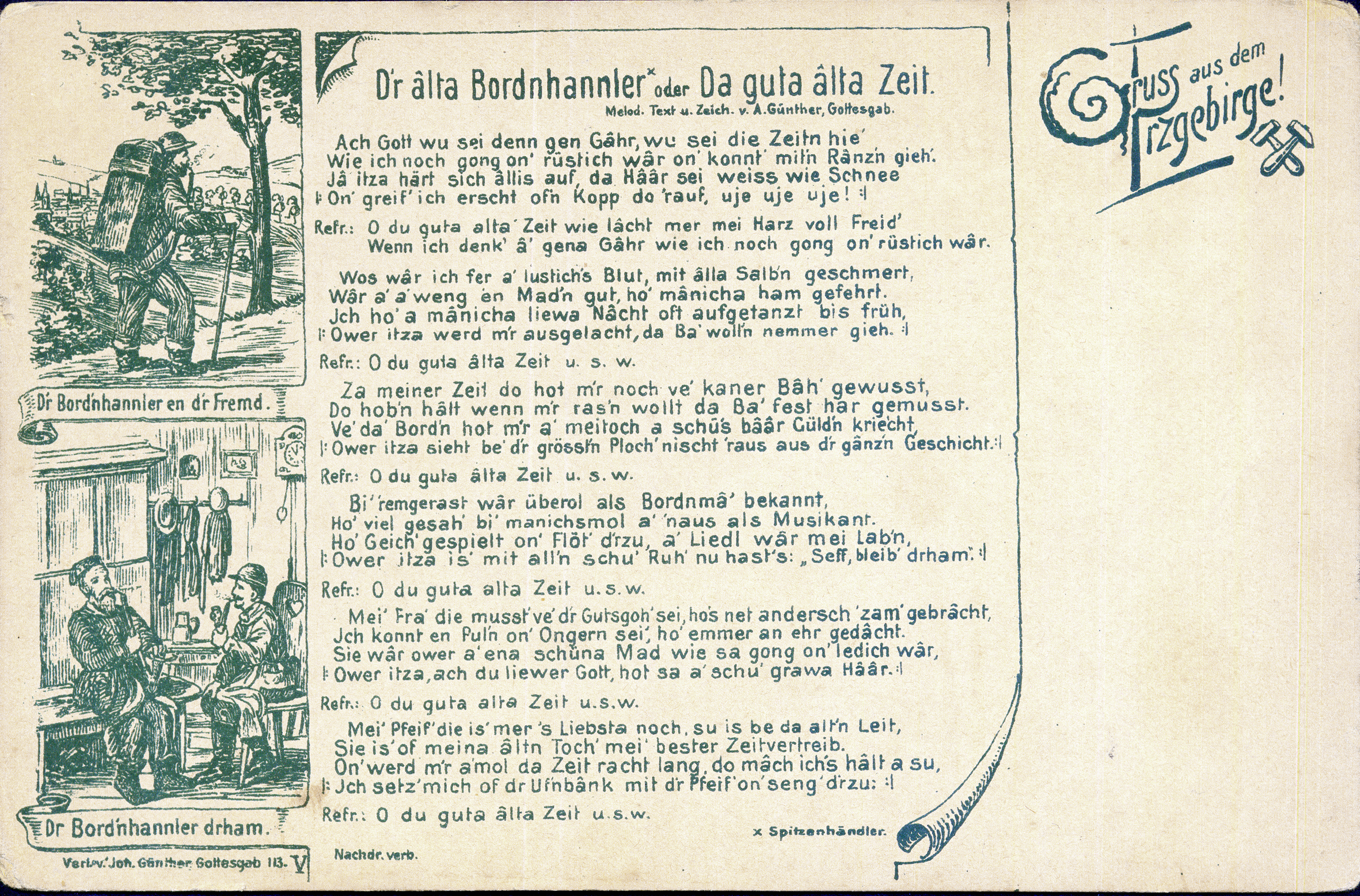 Die Liedpostkarte von Anton Günther mit dem Motiv V - D'r alta Bordnhannler oder Da guta alta Zeit ca.1899 aus dem Verlag des Vaters Johann (bis 1902 als verlag)